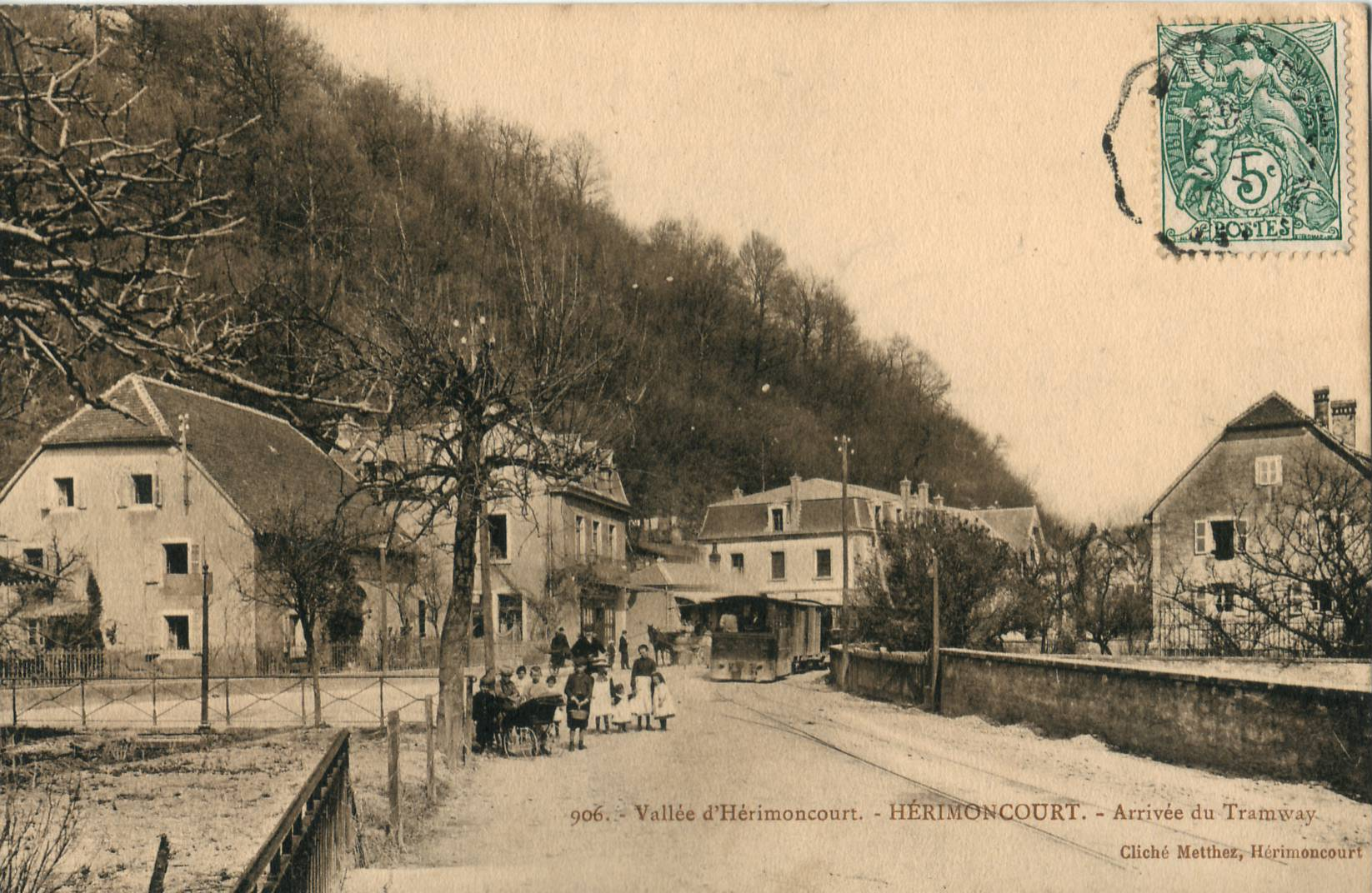 Carte postale ancienne éditée par Metthez à Hérimoncourt : HÉRIMONCOURT - Arrivée du Tramway